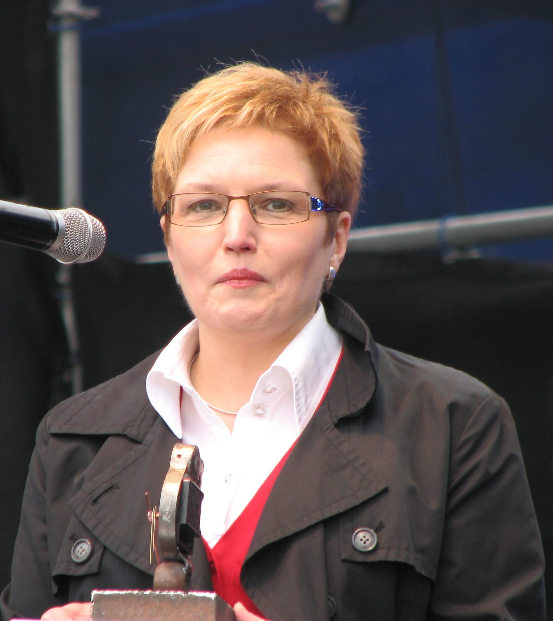 Mall Hellam aasta eurooplase auhinna vastuvõtmisel